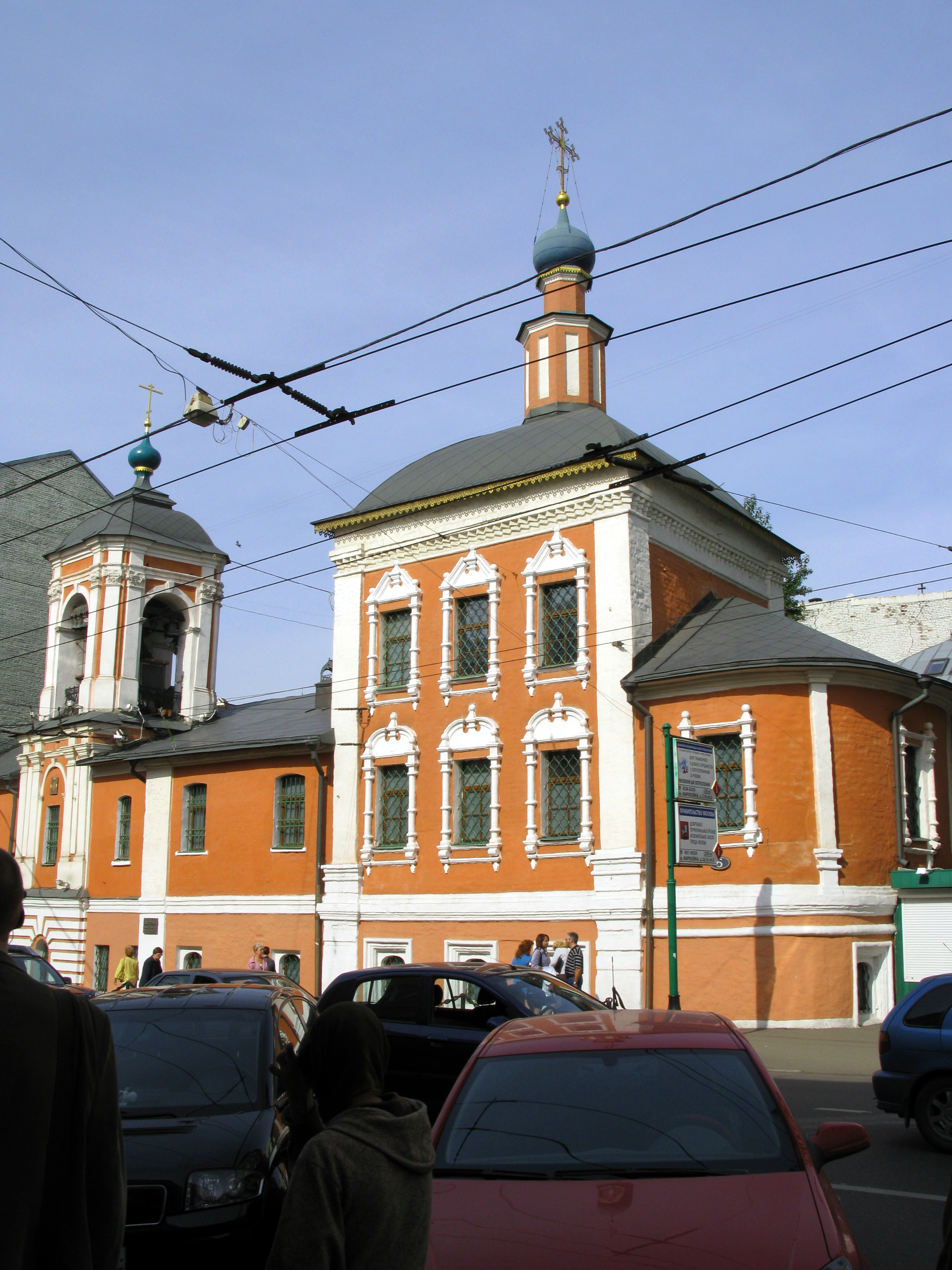 Церковь Николая Чудотворца в Клённиках